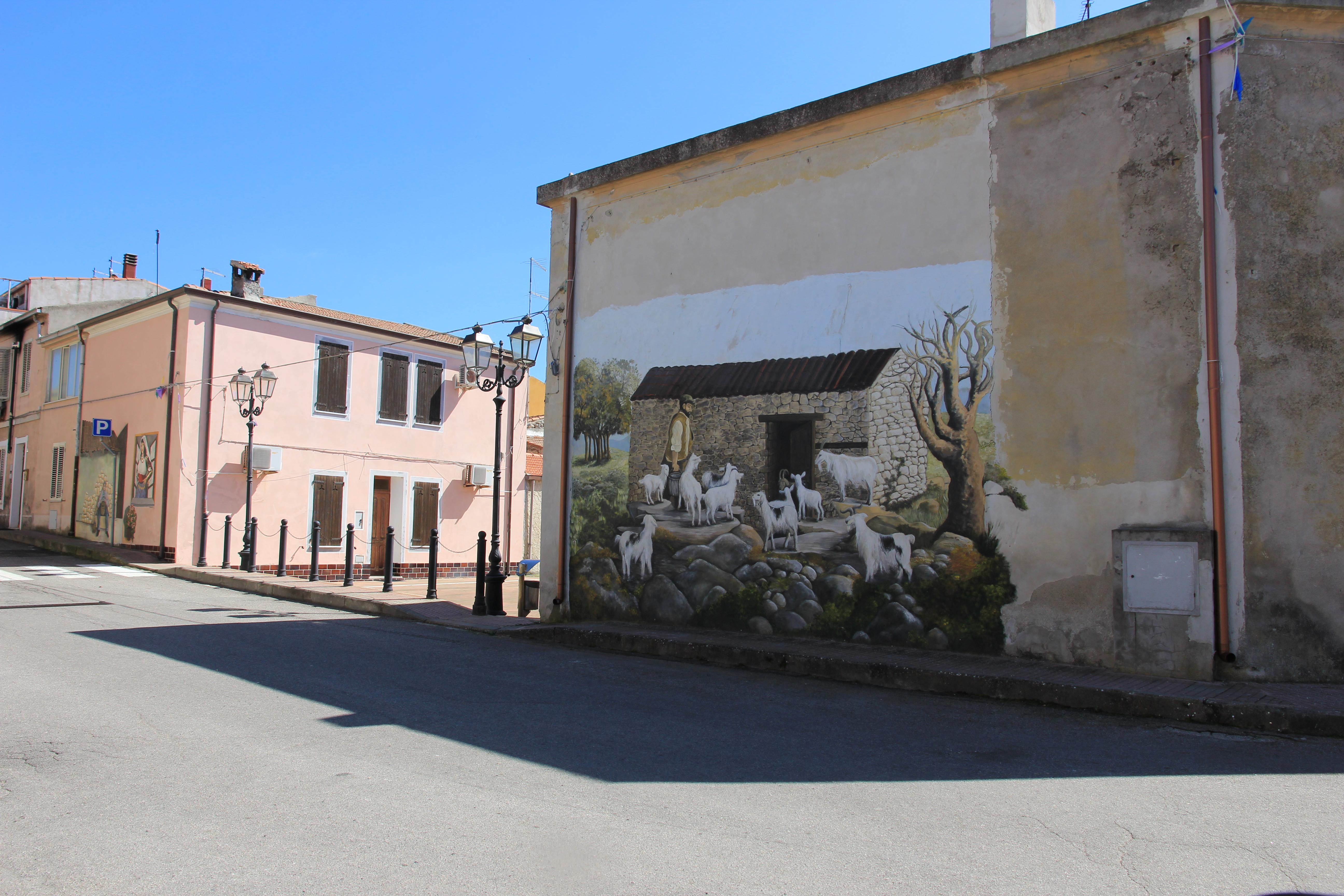 Romana - Panorama